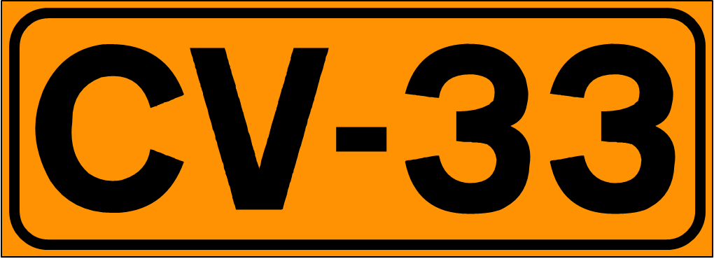 Inidcador de la Carretera de la Comunidad Valenciana CV-33